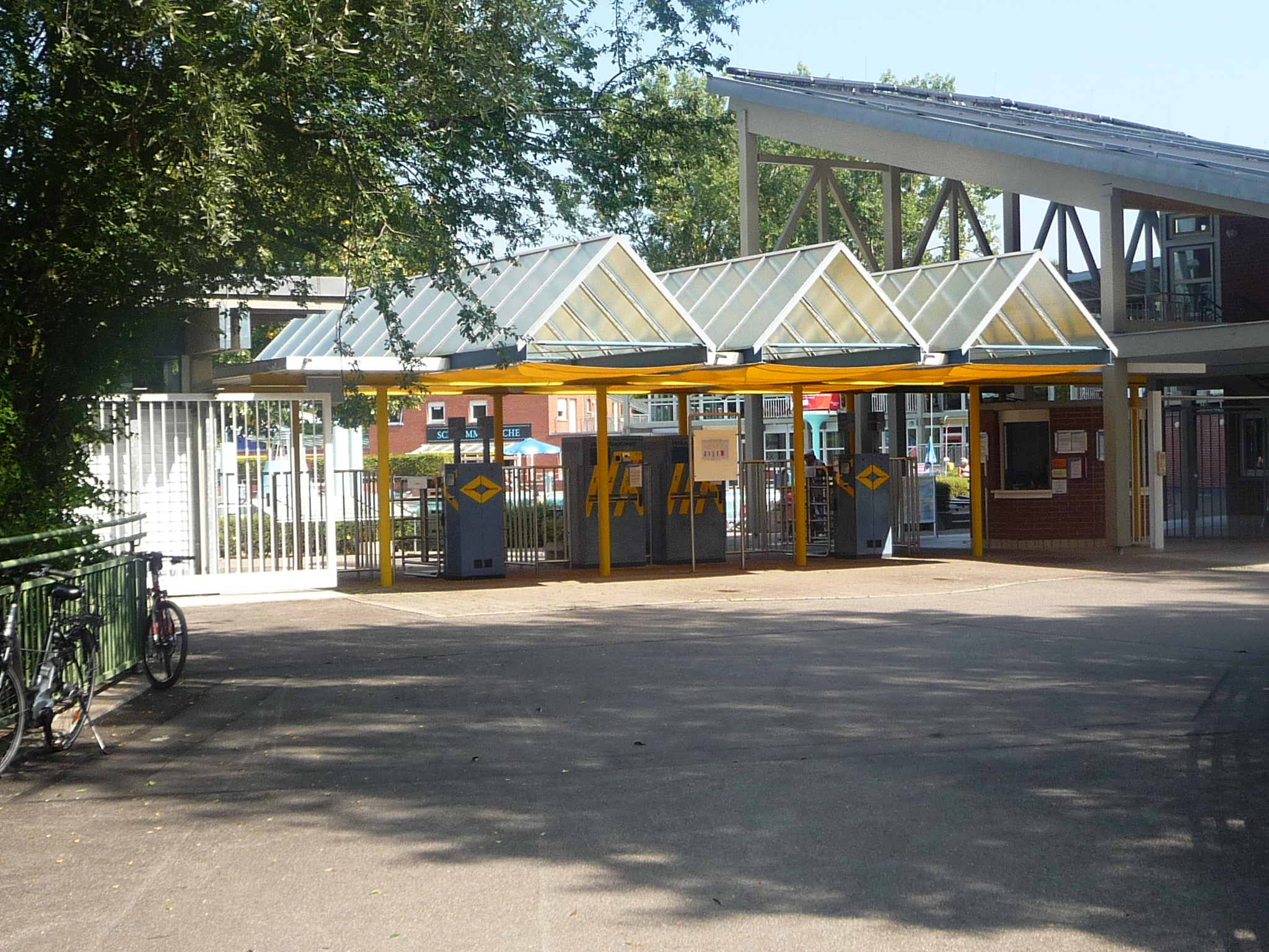 Leobad – Eingangsbereich